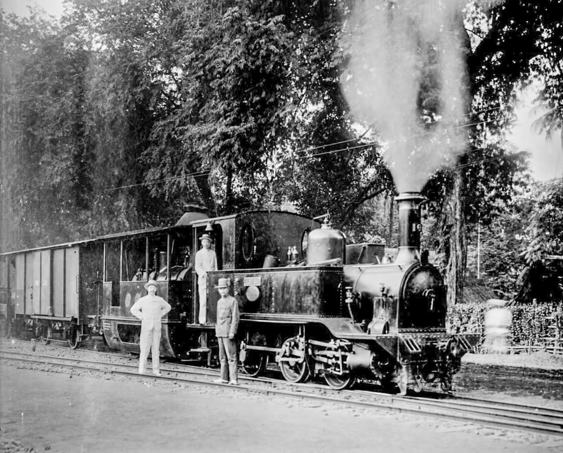 Lokomotif C2201 "LOUISA"